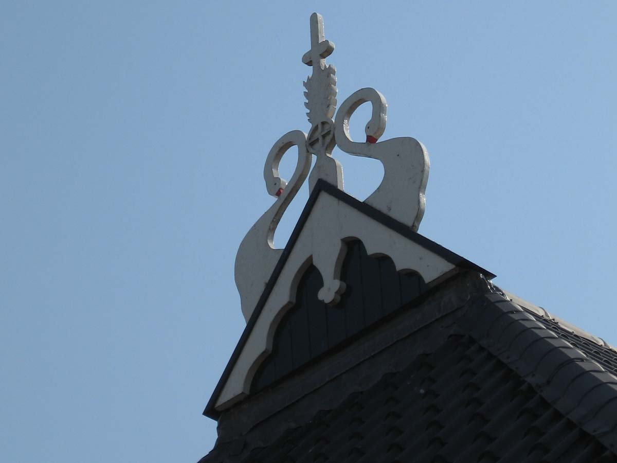 In ûleboerd op in pleats yn Mid-Fryslân